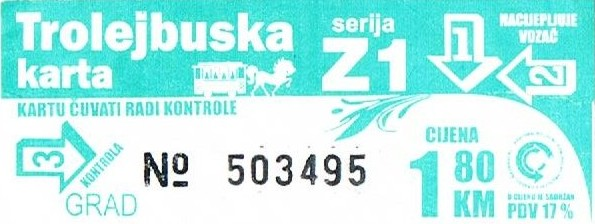 aktuelles Ticket für den Oberleitungsbus in Sarajevo